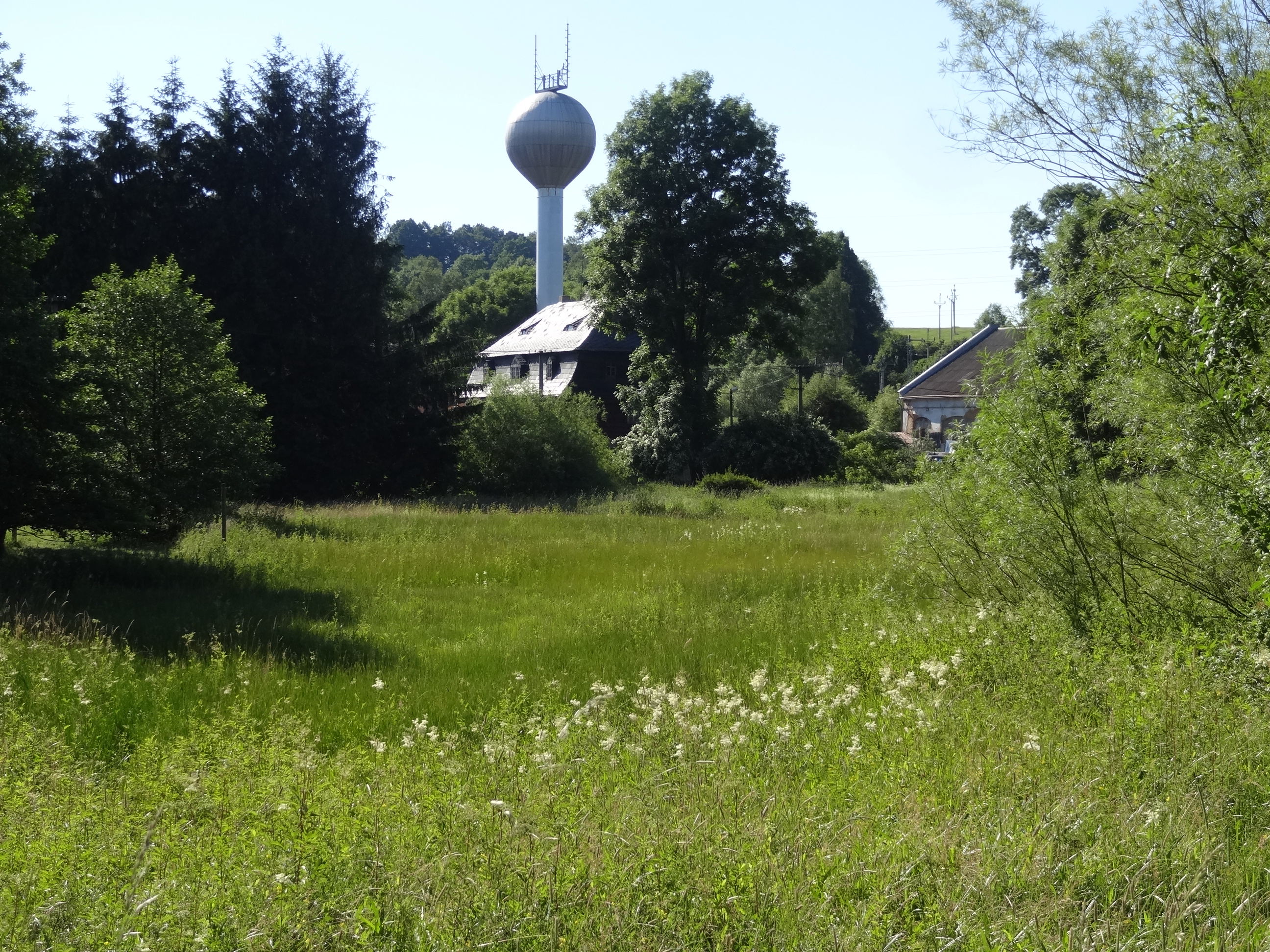 PP Louka u Brodských v Dolní Chřibské chrání jedinečné naleziště prstnatce májového a dalších ohrožených druhů rostlin.